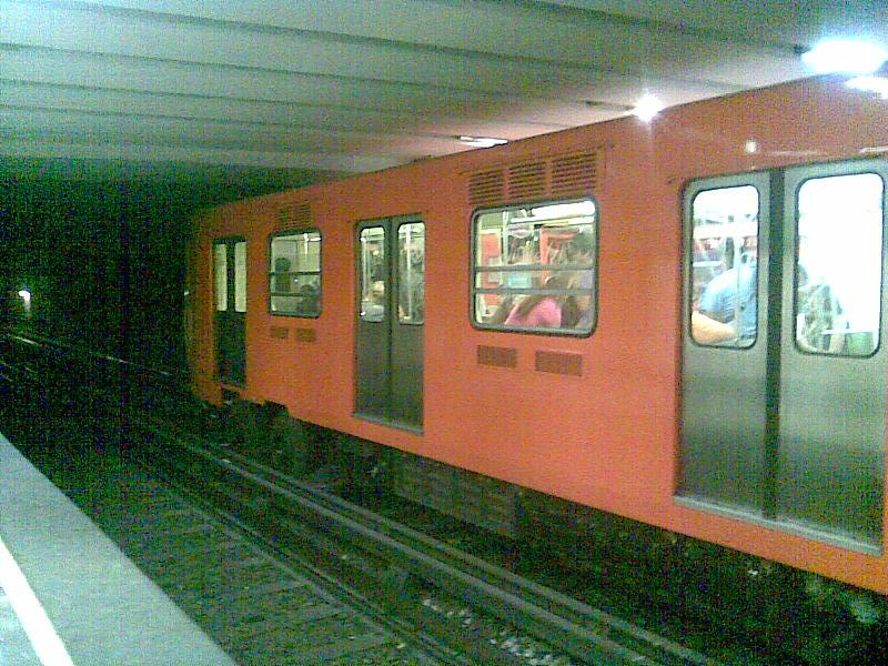 NC-82 en la estación Centro Médico de la Linea 3.